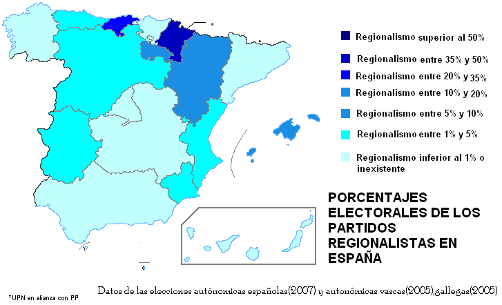 Espainiako indar erregionalisten irudikapena erkidegoka